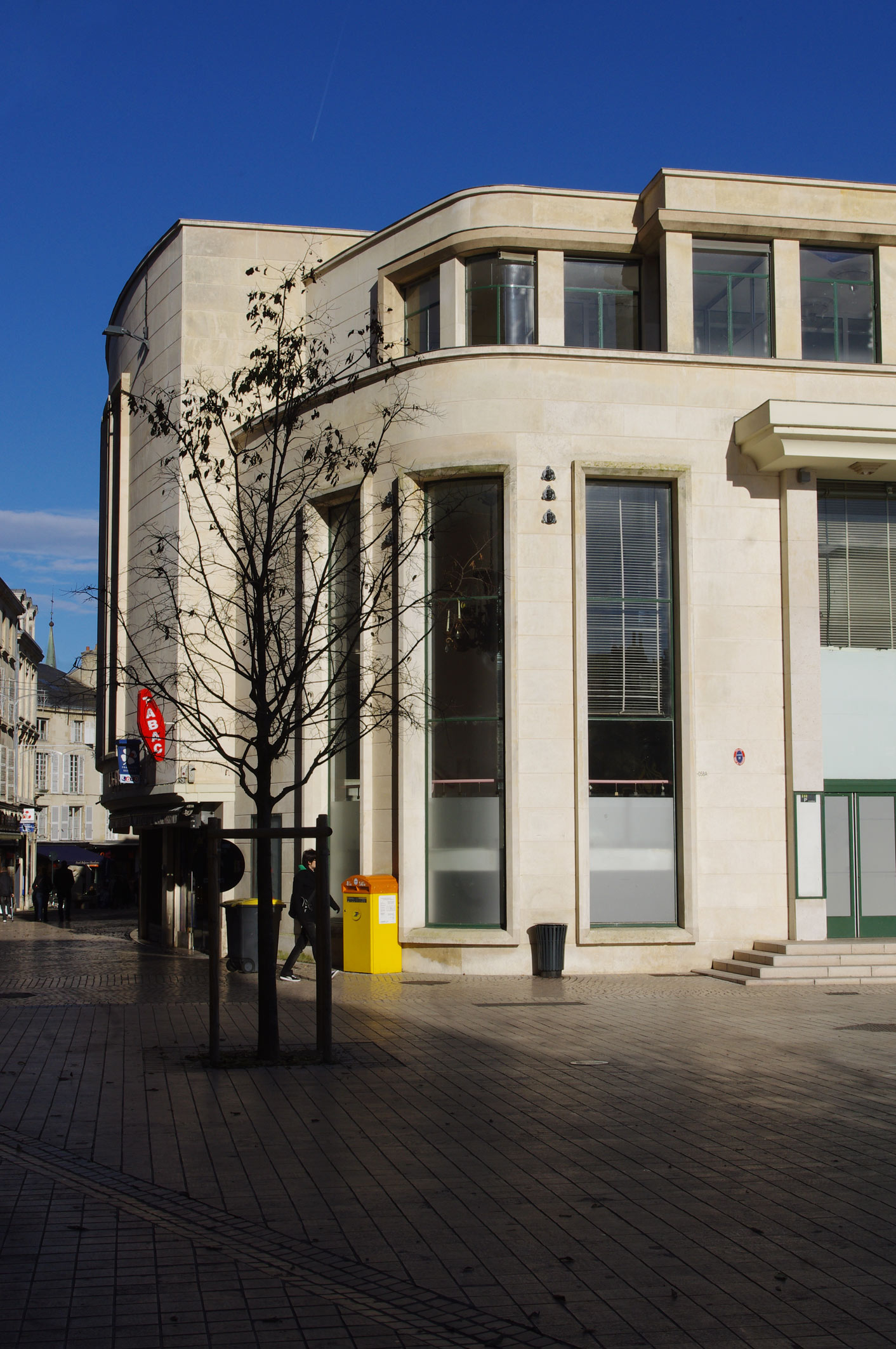 Façade de l'ancien théâtre municipal de Poitiers (1954) après fermeture (photo décembre 2013), détail de l'angle du côté de la rue de la Marne.